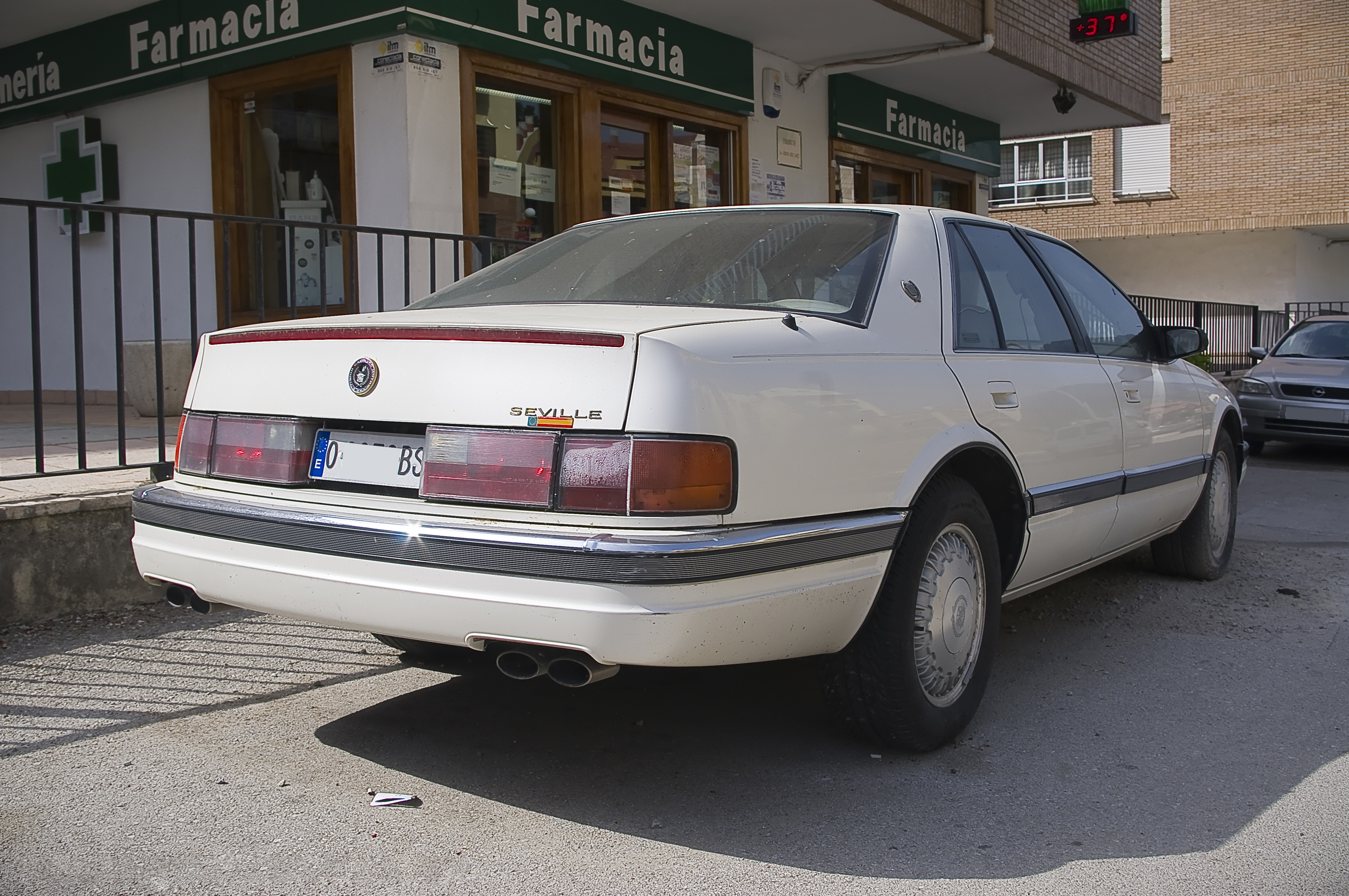 1992-1994 Cadillac Seville STS